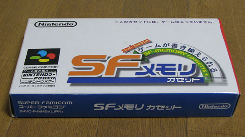 任天堂製 SFメモリカセット（パッケージ） 撮影者・投稿者 : e3uematsu